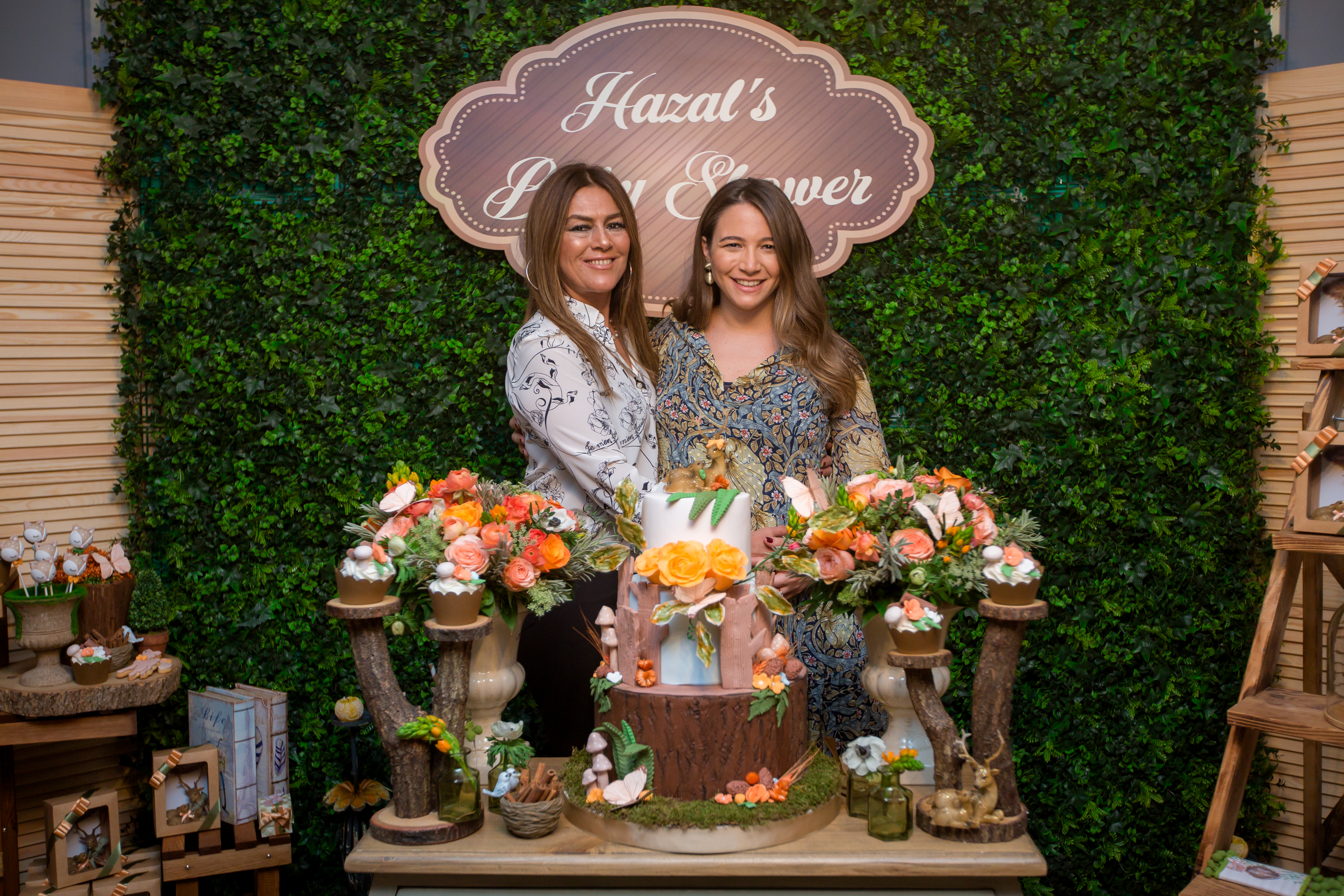 Melike Zobu ve kızı Hazal Kalkavan Karahan